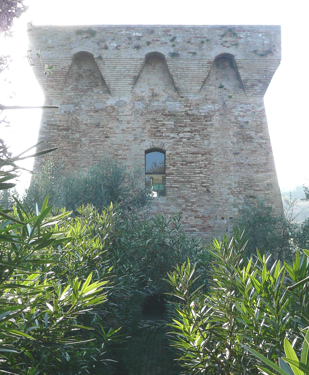 E' una delle Torri costiere del Regno di Napoli sopravvissute in Abruzzo, si trova a Giulianova (TE), nei pressi della foce del torrente Salinello.